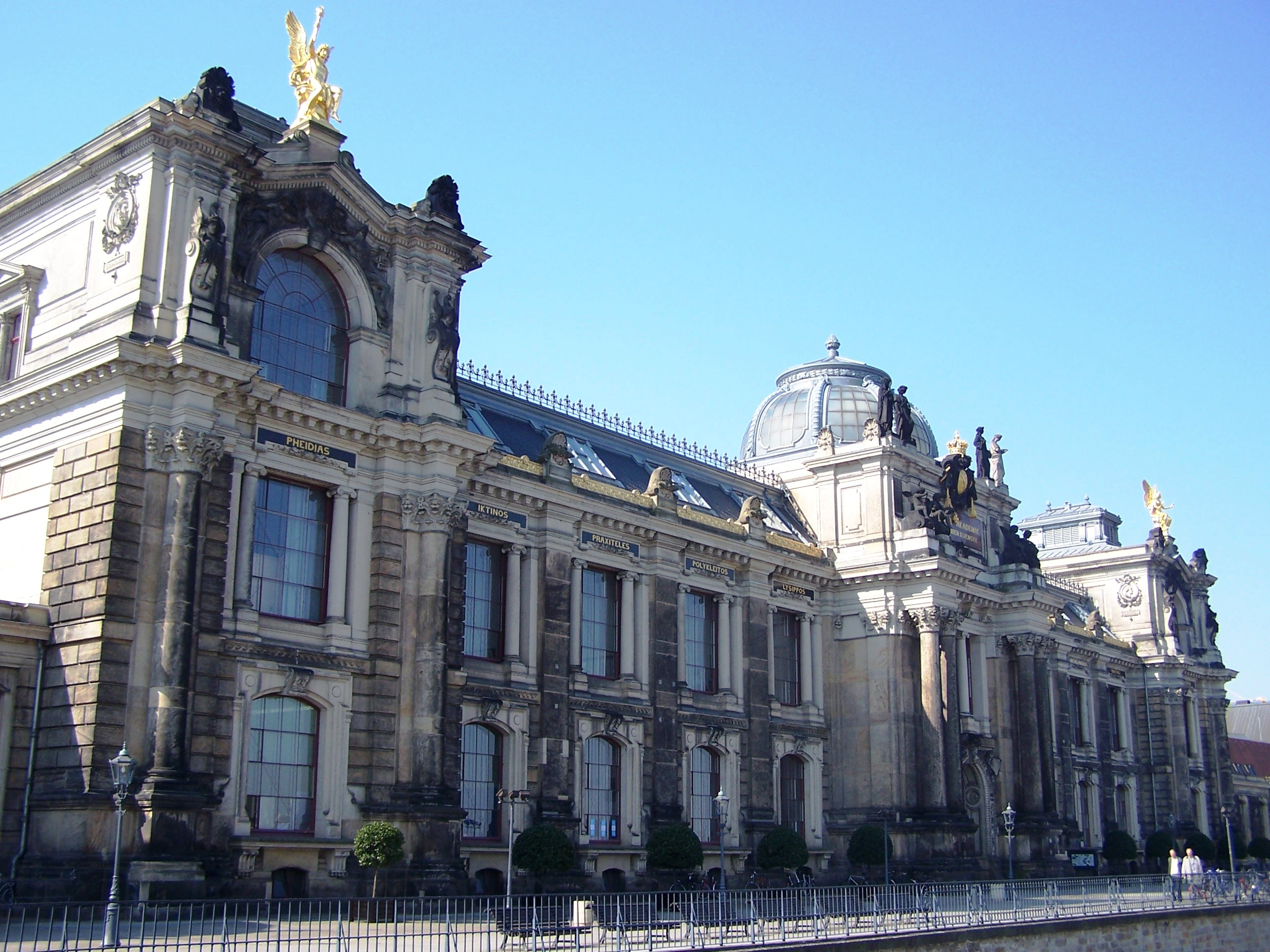 Kunstakademie Dresden, zur Brühlschen Terrasse